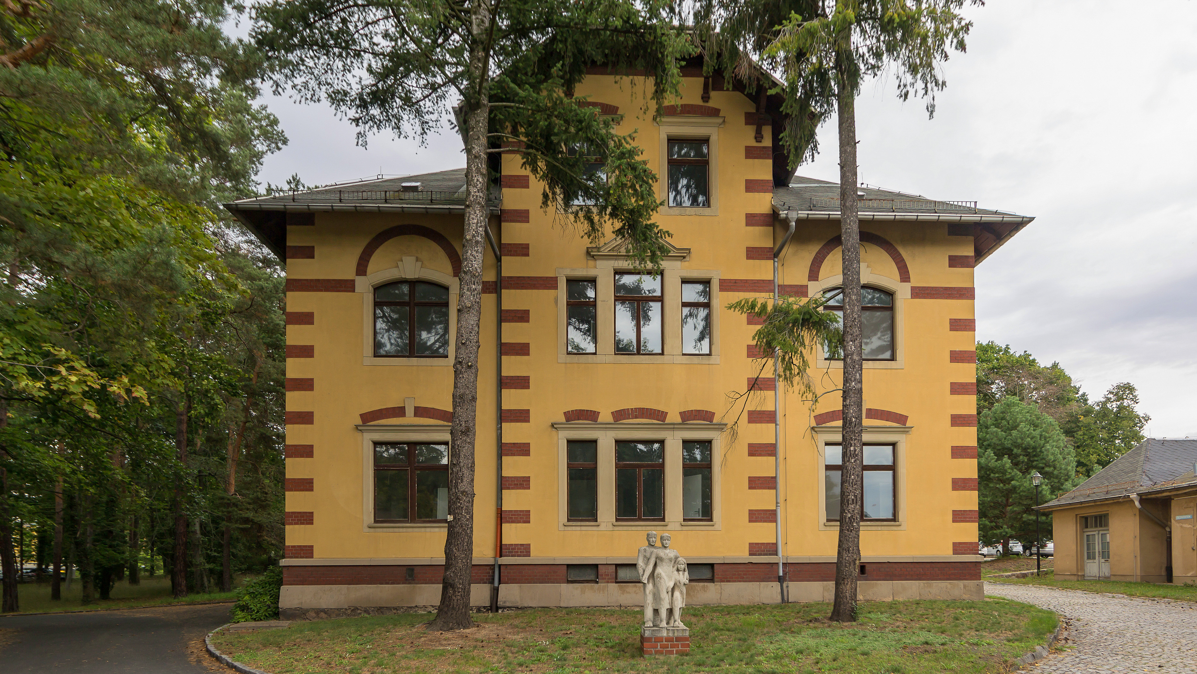 Neucoswig Neucoswiger Straße 21 Heilstätte Lindenhof (Sachgesamtheit) Park mit Skulptur VIII